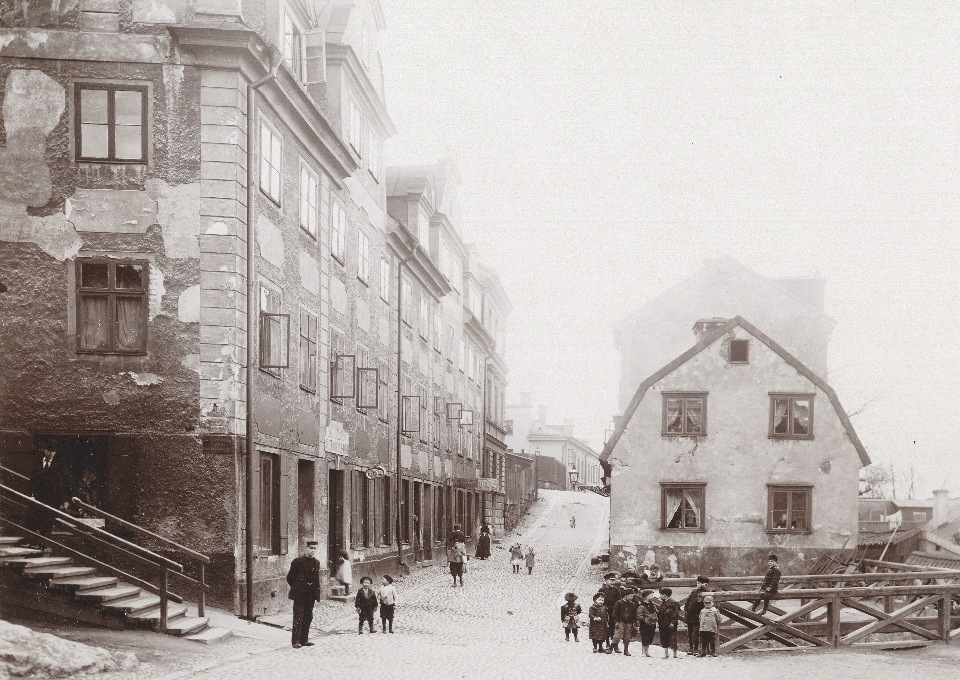 Elias Kuhlmans hus i hörnet Lilla Glasbruksgatan (dagens Klevgränd) / Katarina kyrkobacke